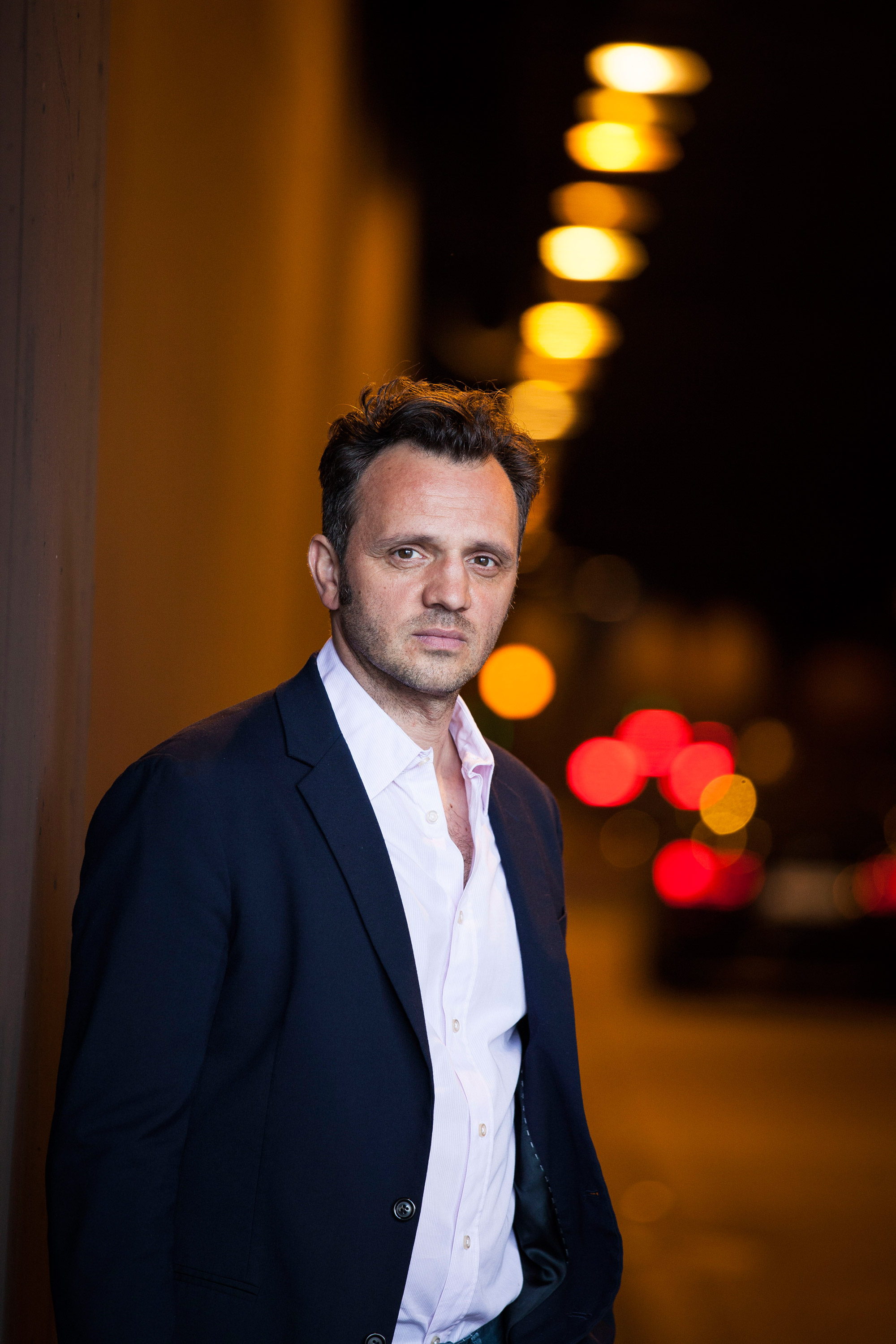 Roland Silbernagl